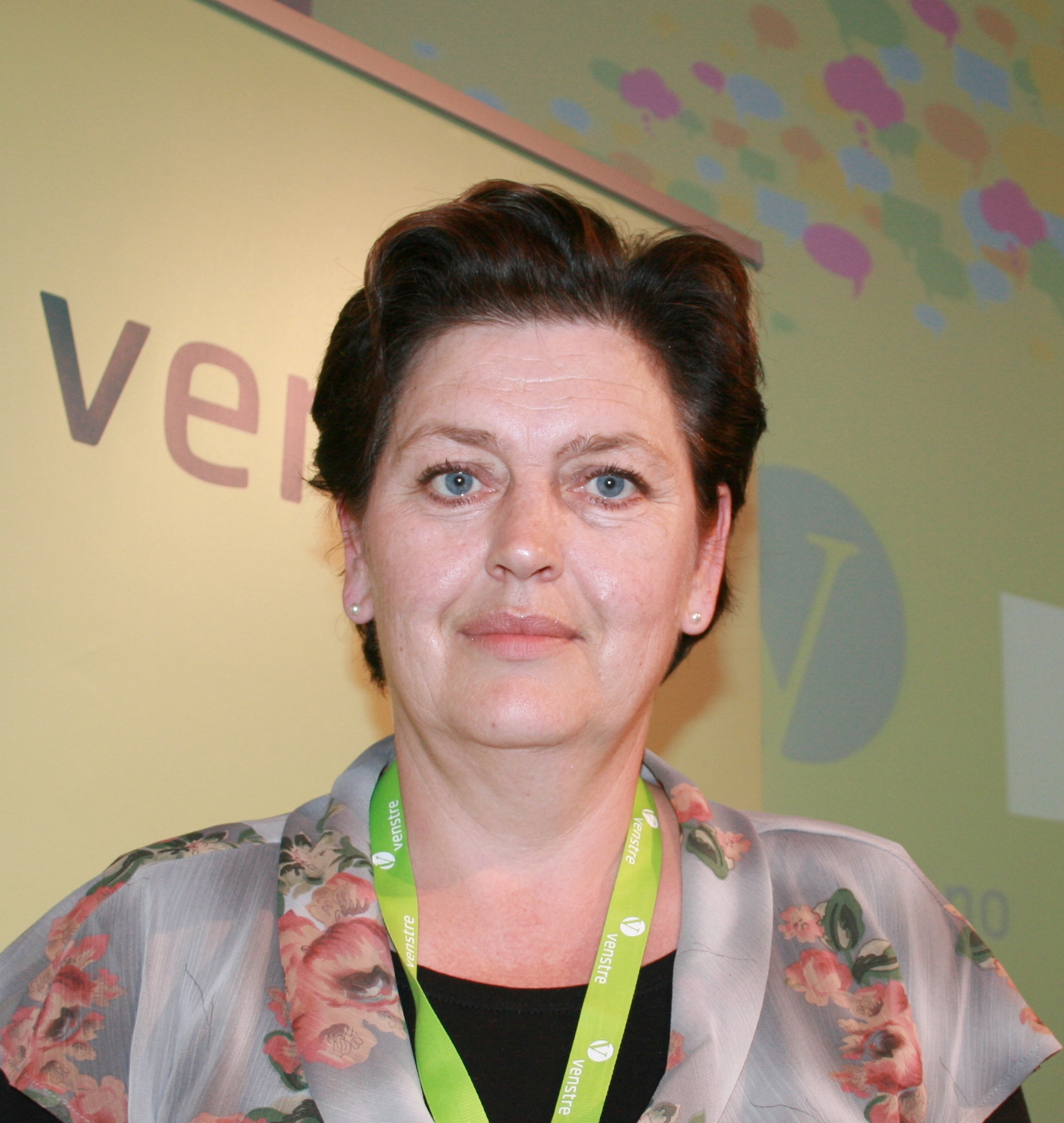 Rita Sletner, Venstre-politiker